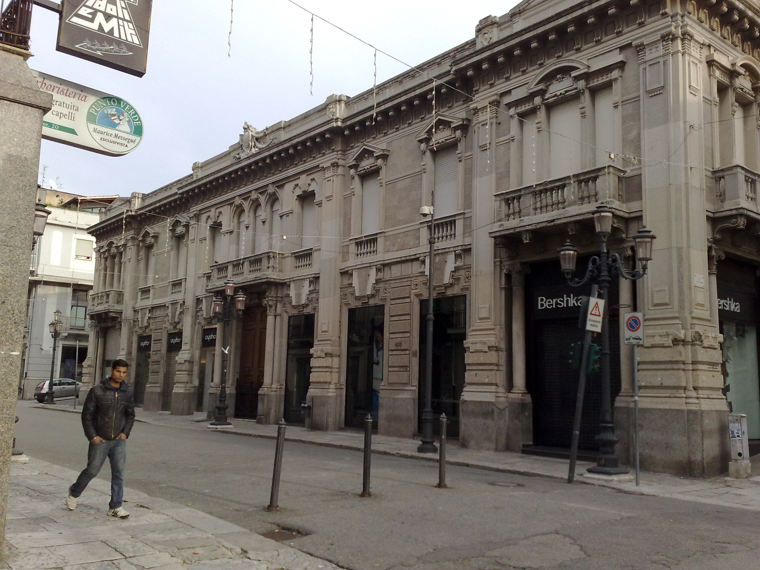 Antico palazzo nobiliare sul corso Garibaldi di Reggio Calabria